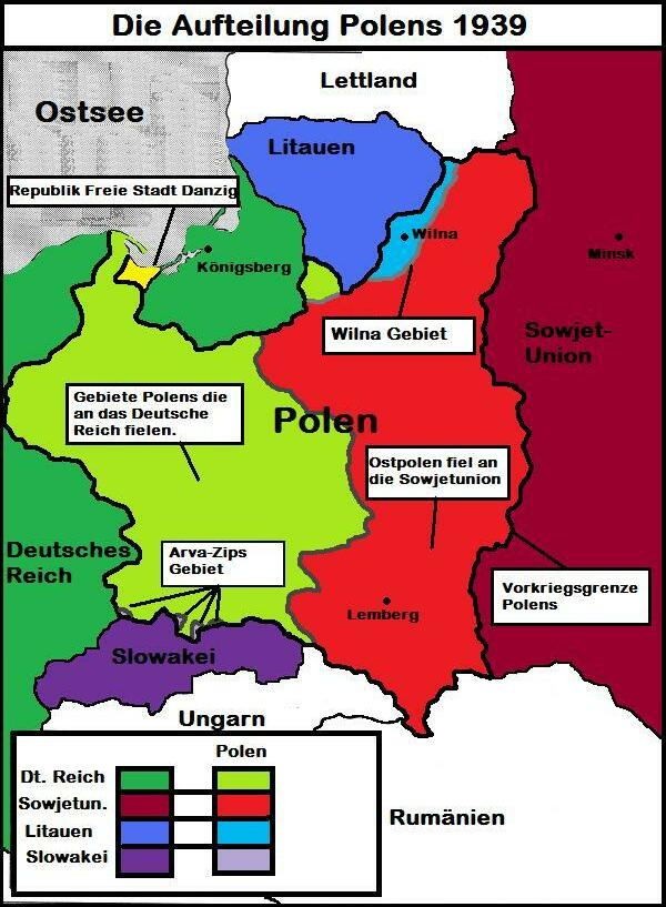 Die Teilung Polens 1939